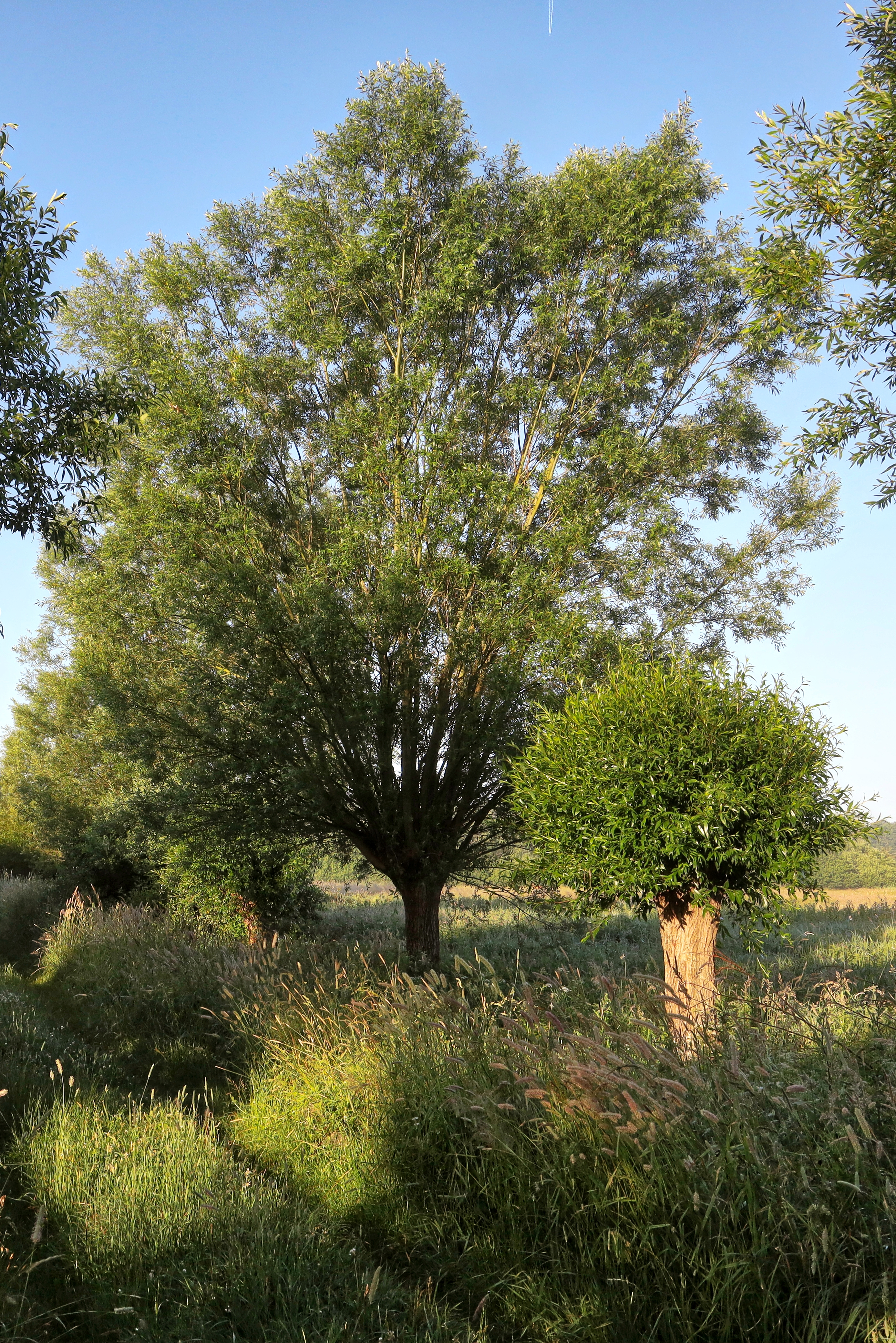 Kopfweiden in unterschiedlichem Beschnittstadium NSG Oberalsterniederung